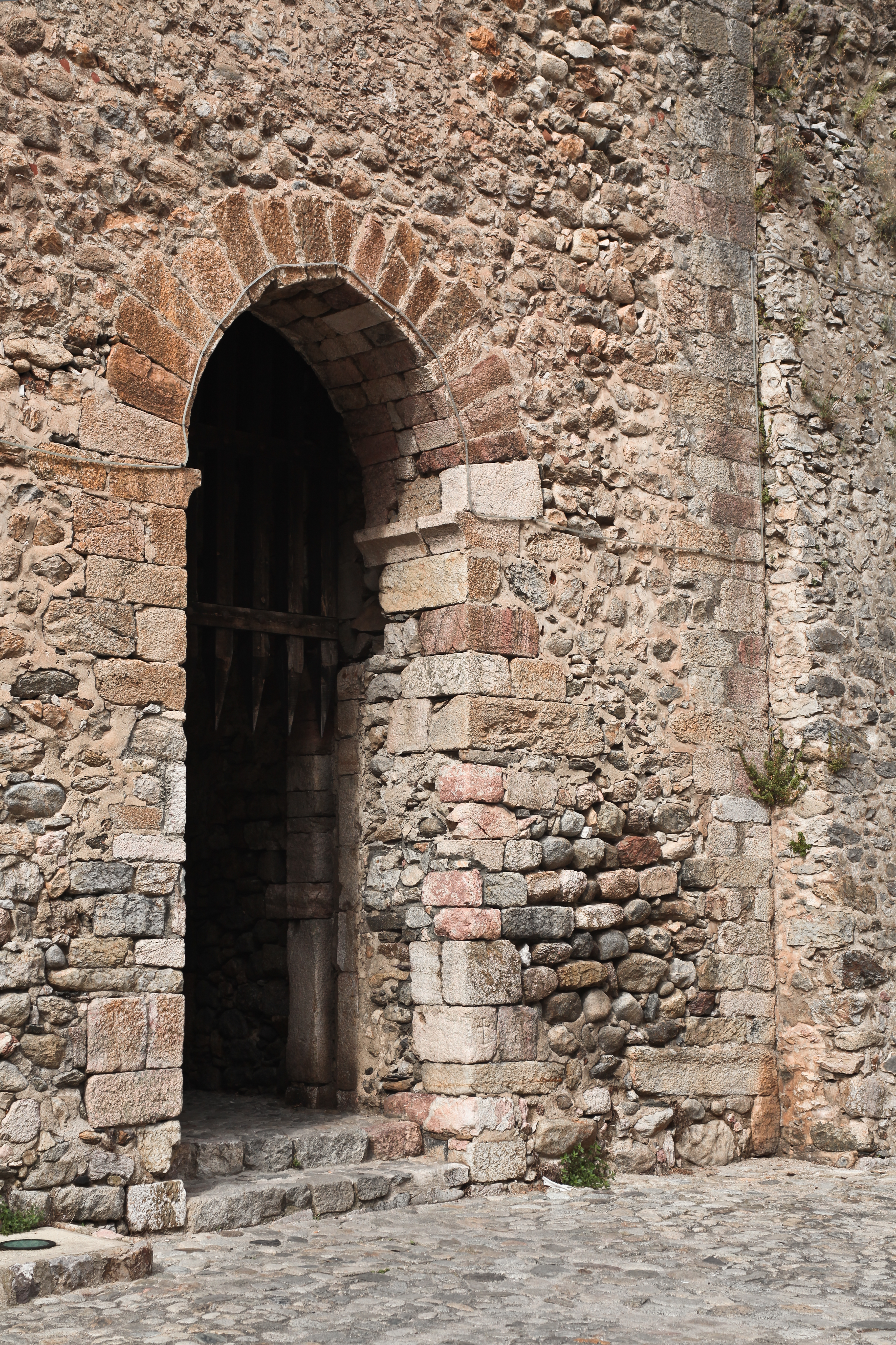 Remparts (ClasséClasséClassé) .